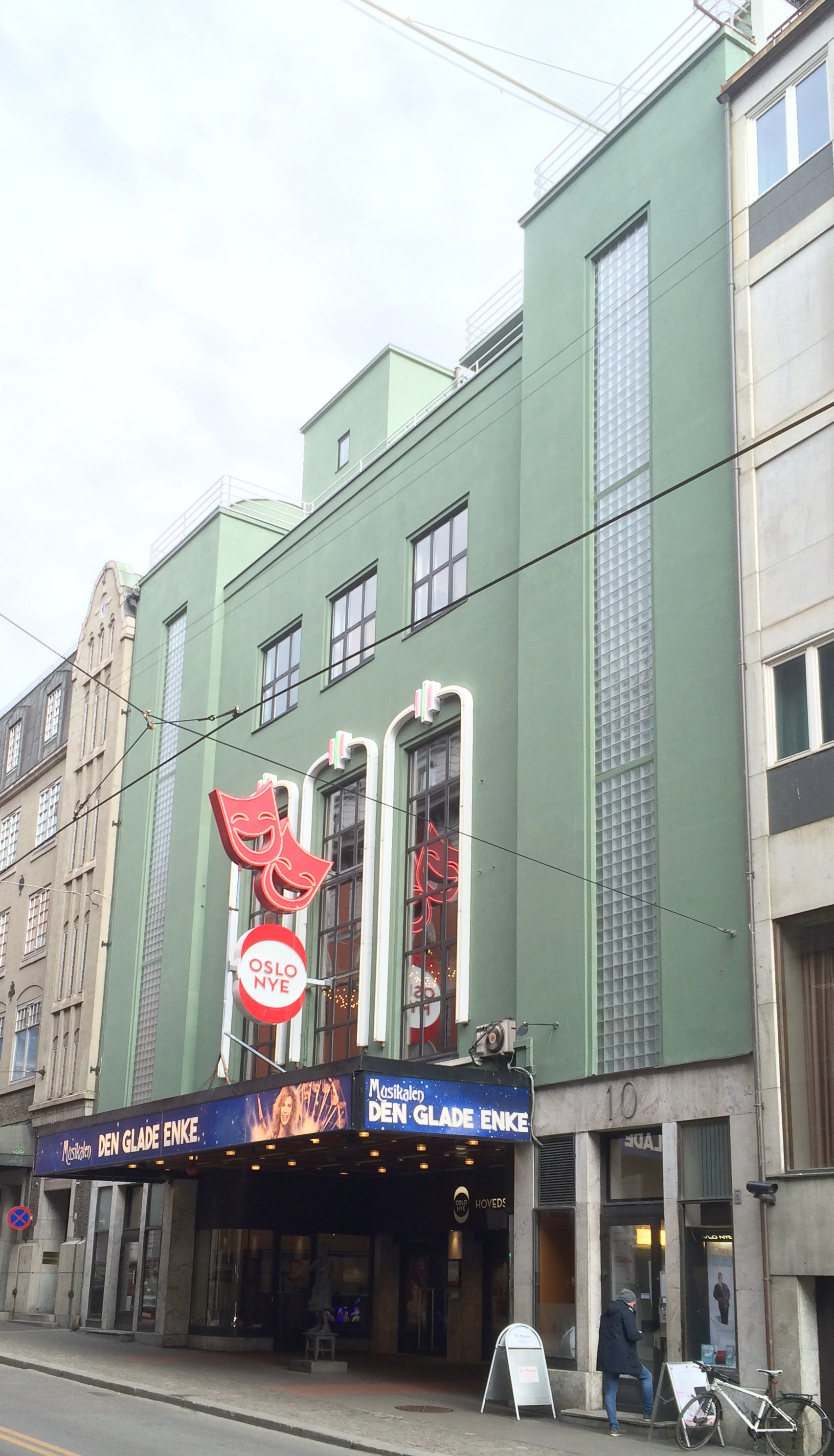 Oslo Nye Teater, Rosenkrantz' gate 10